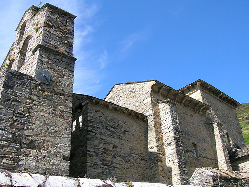 Santiago de Peñalba: vista parcial.